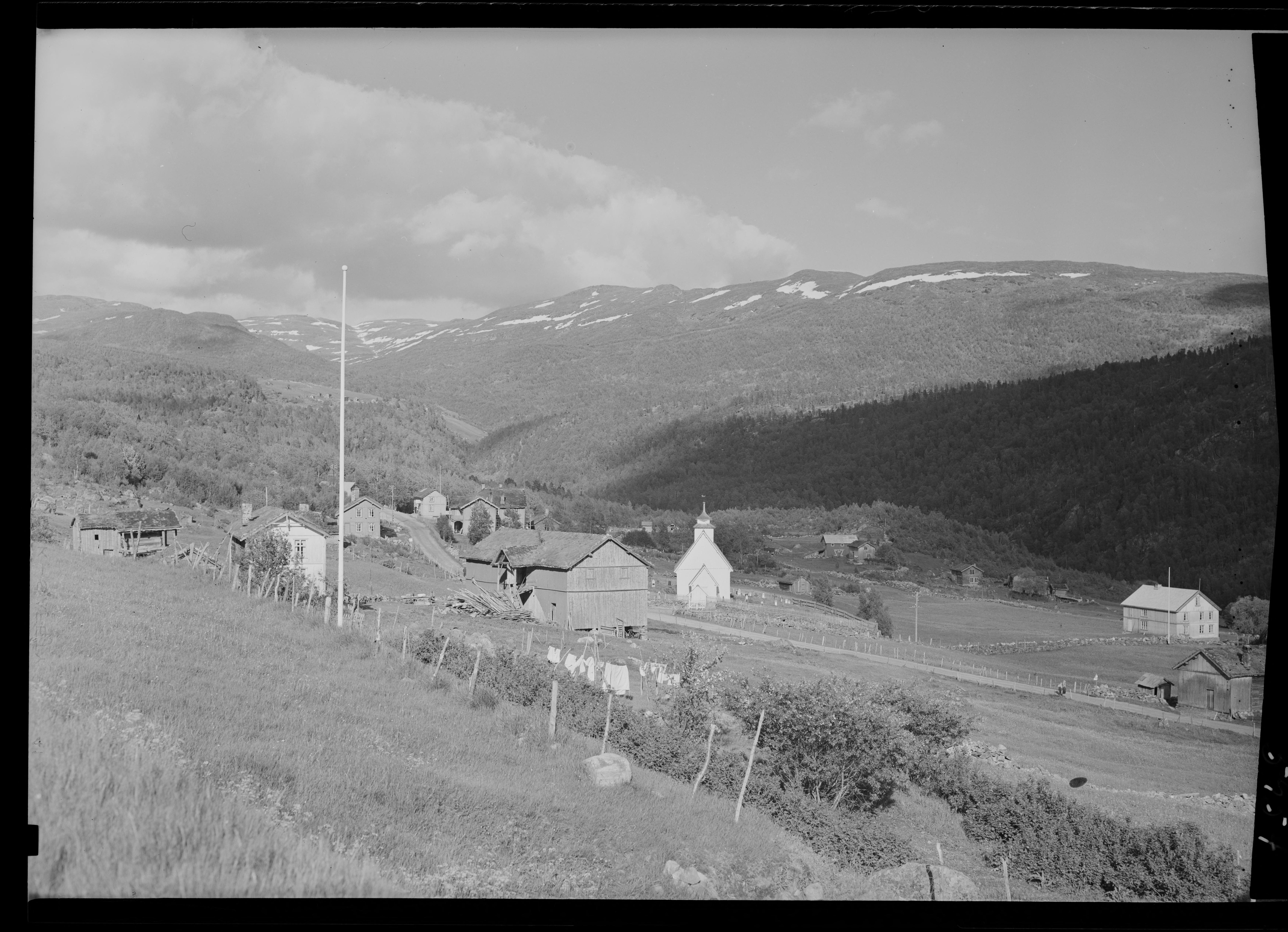 Bildet er hentet fra Nasjonalbibliotekets bildesamling. Anmerkninger til bildet var: Fotograf:Ukjent Bykle,Setesdal, Bykle, Aust Agder